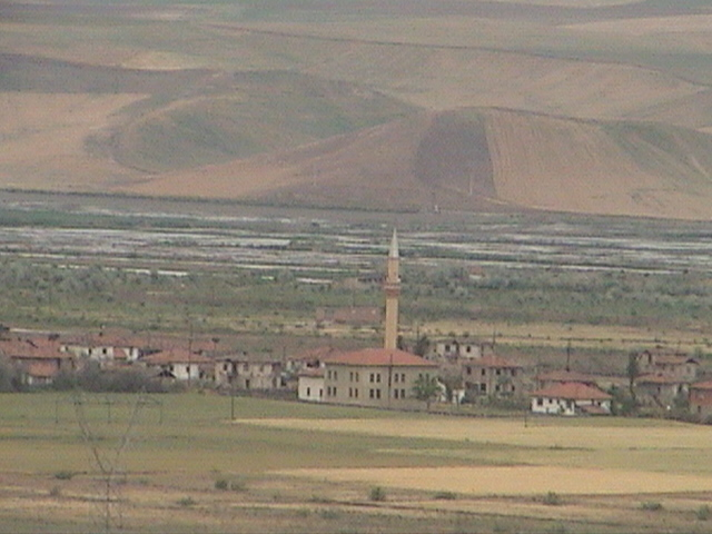 Kumçelteği Village and water, Çorum, Turkey